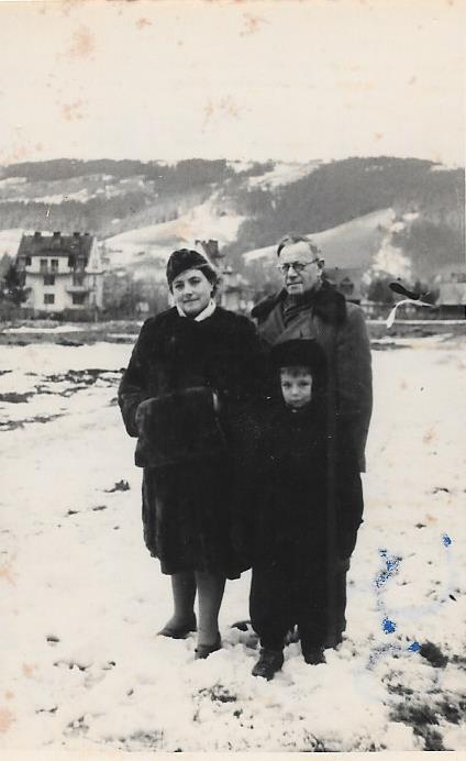 מריאנסקי עם הוריו מרים ומתתיהו בעירת נופש זאקופנה בדרום פולין ליד גבול צ'כוסלובקיה 1950